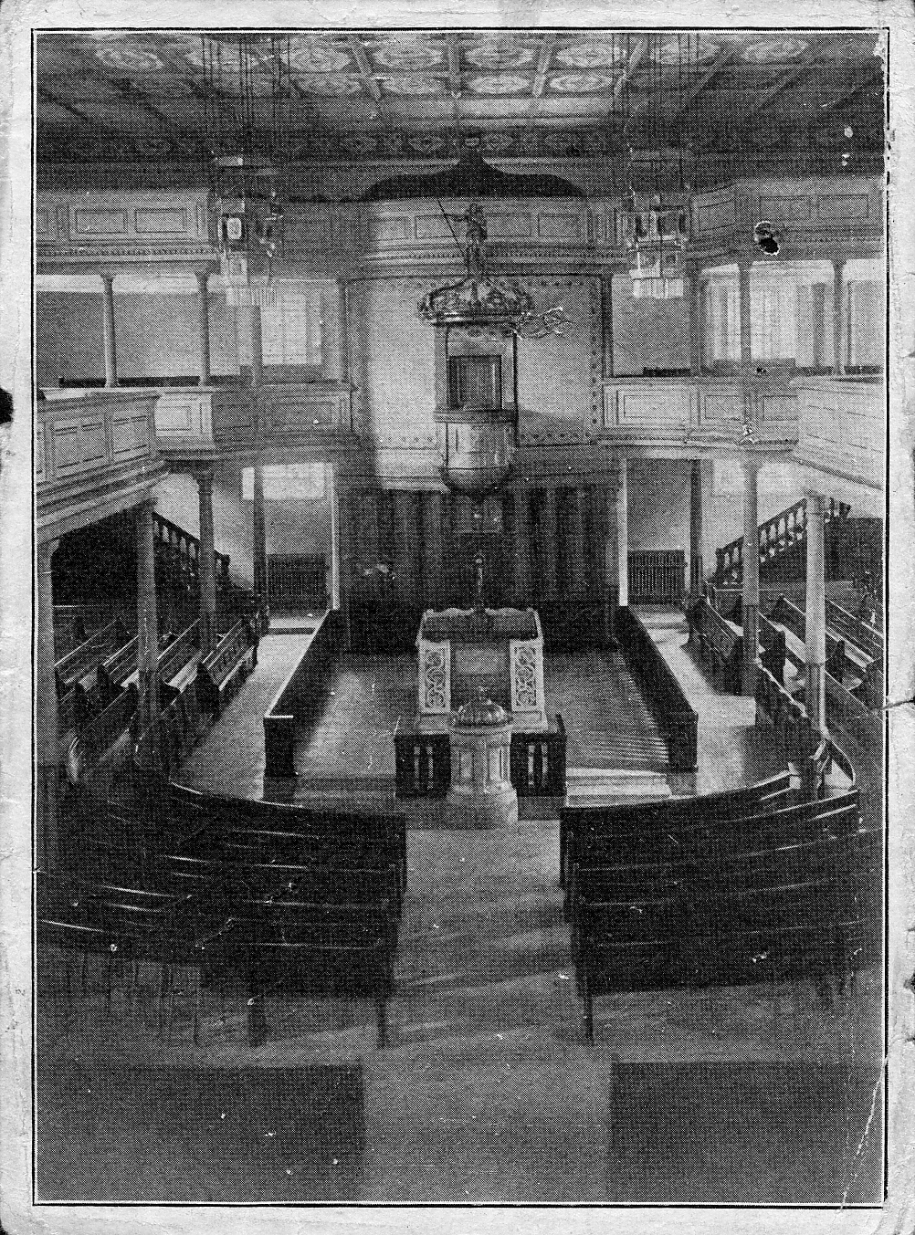 Inneres nach der Renovierung von 1909, mit Altarschranken und integriertem Taufstein sowie festem Gestühl in Hufeisen-Anordnung